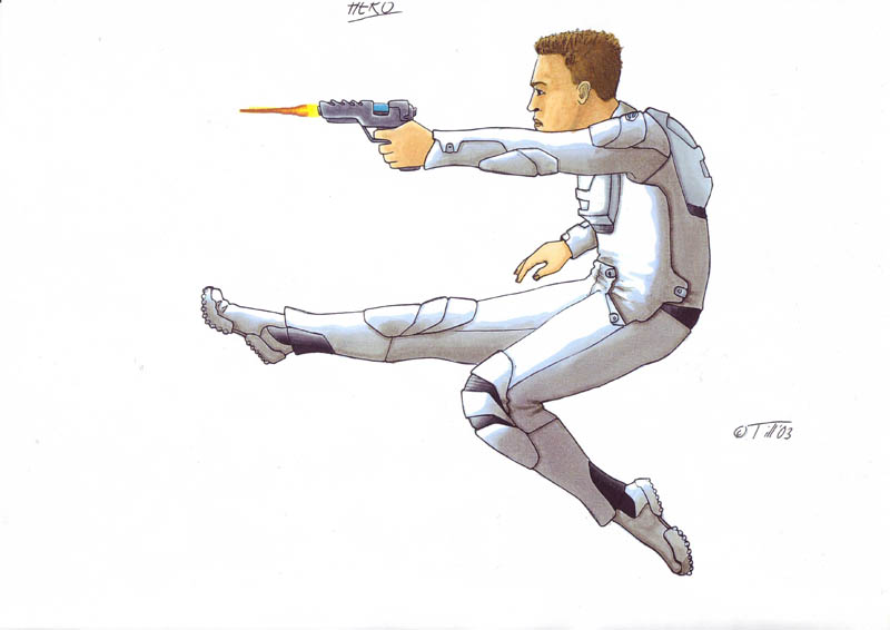 Entwurfzeichnung von Till Fuhrmann